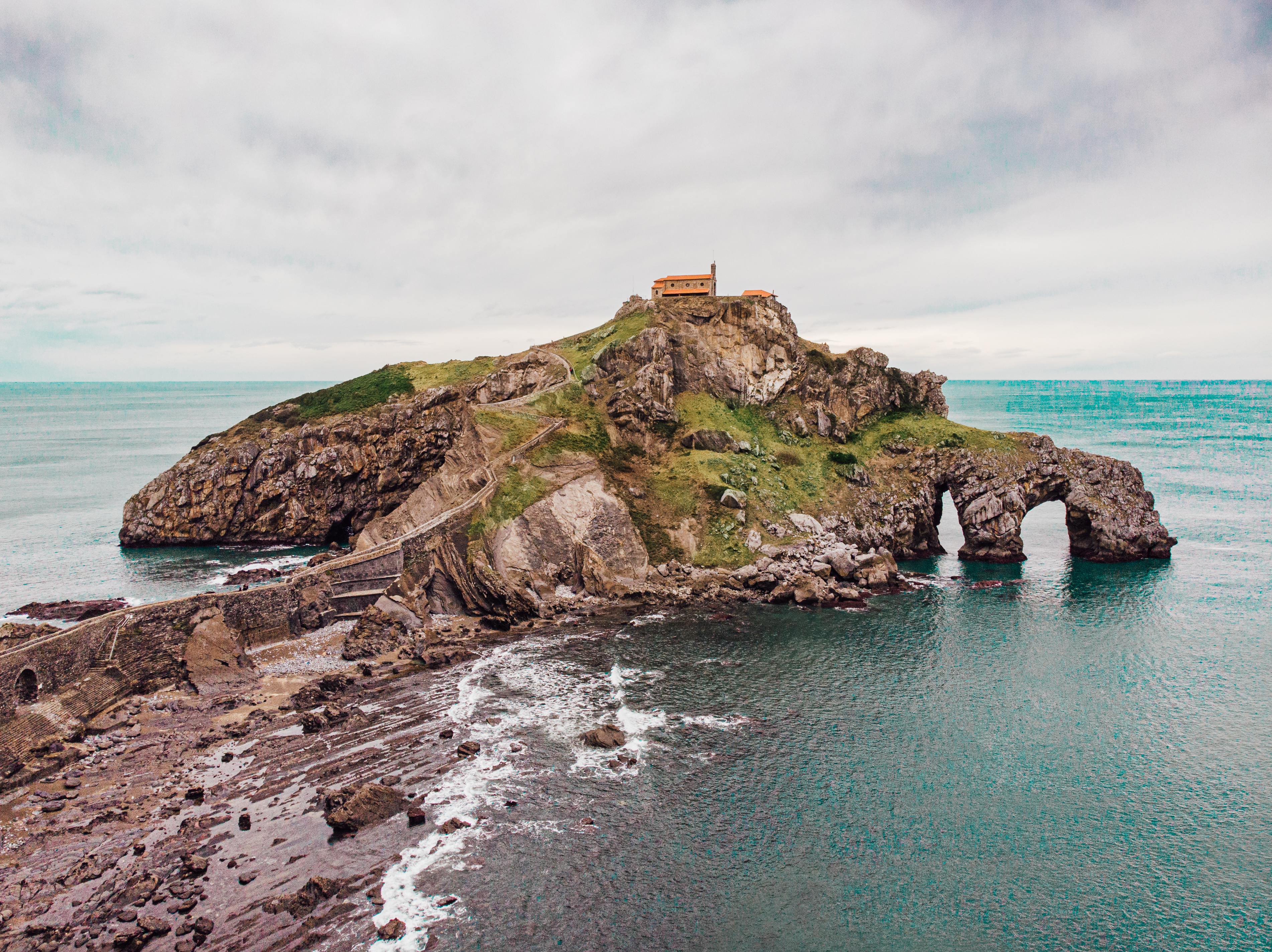 Photo de Gaztelugatxe depuis la cote